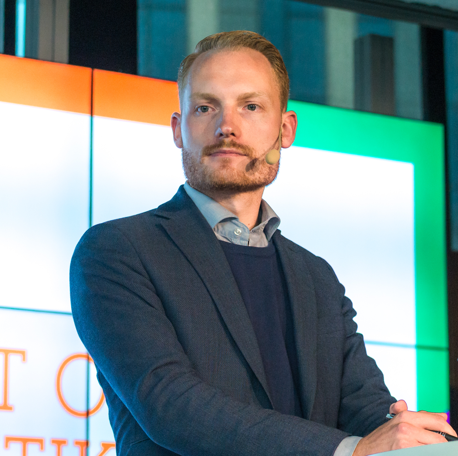 SD:s kulturpolitiske talesperson Aron Emilsson under en politisk debatt på Kulturhuset i Stockholm den 28 augusti 2018.